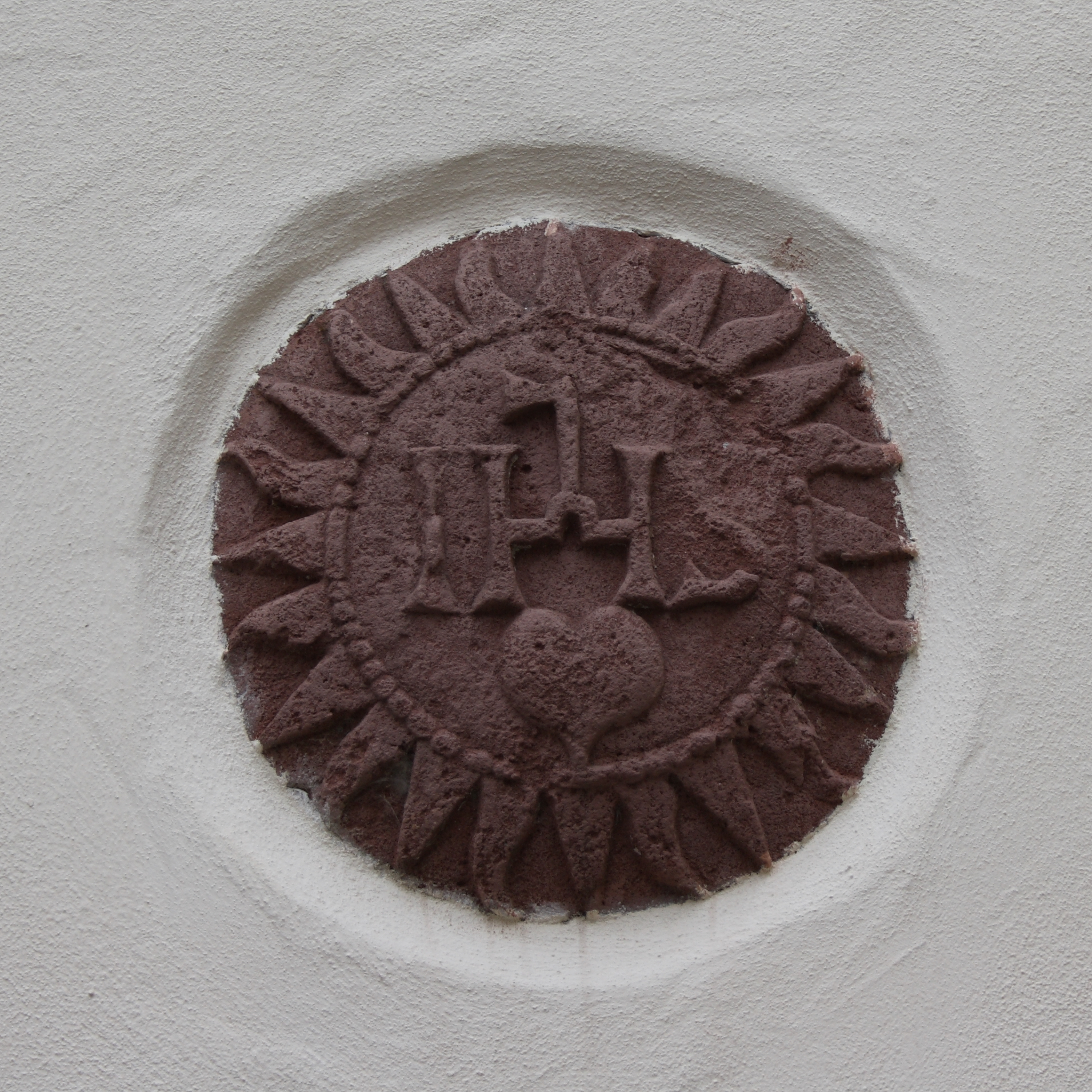 katholische Pfarrkirche St. Michael in Lohr am Main im Landkreis Main-Spessart (Bayern)